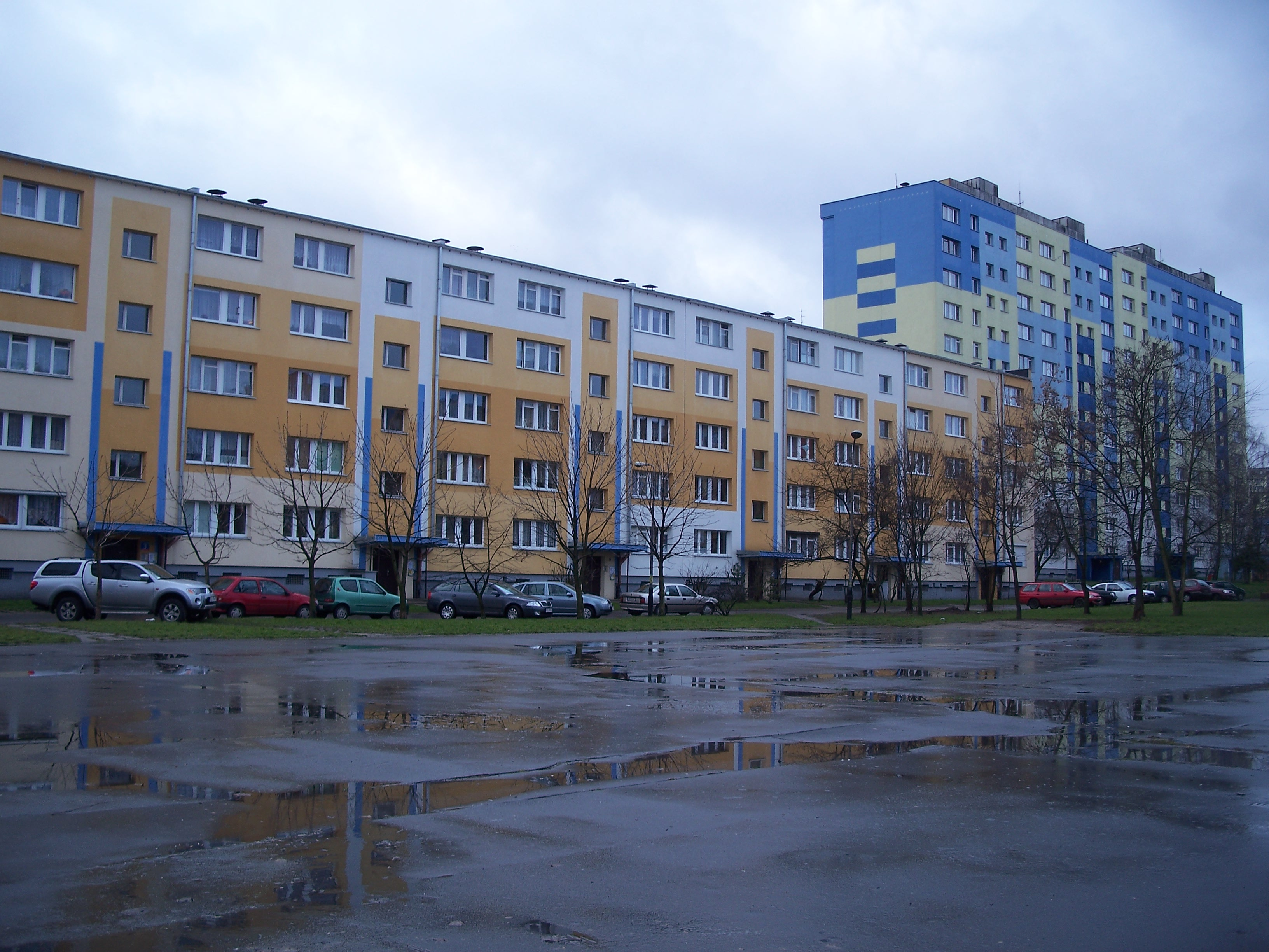 Osiedle Retkinia-Zagrodniki w Łodzi - bloki mieszkalne